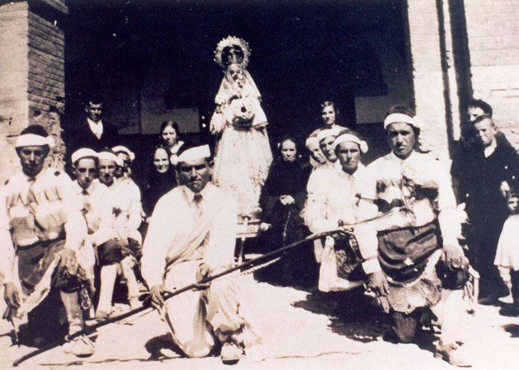 Danza - Villafrades de Campos (Valladolid) - Fotografía 150 x 100 B/N